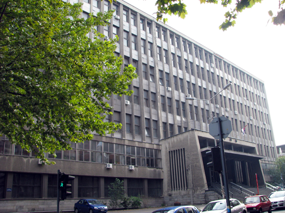 Tehnoloski fakultet